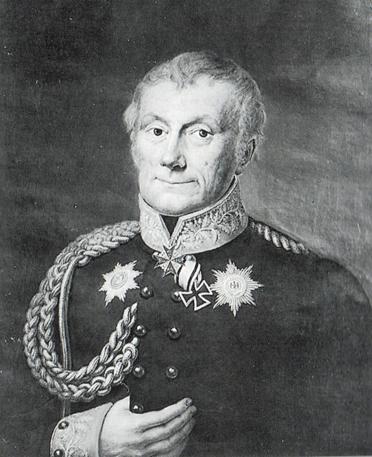 Ölgemälde von Ludwig von Brauchitsch, früher im Schloß Königsberg.